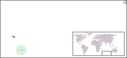 Locatie Heard en McDonald eilanden; eigen werk: GFDL